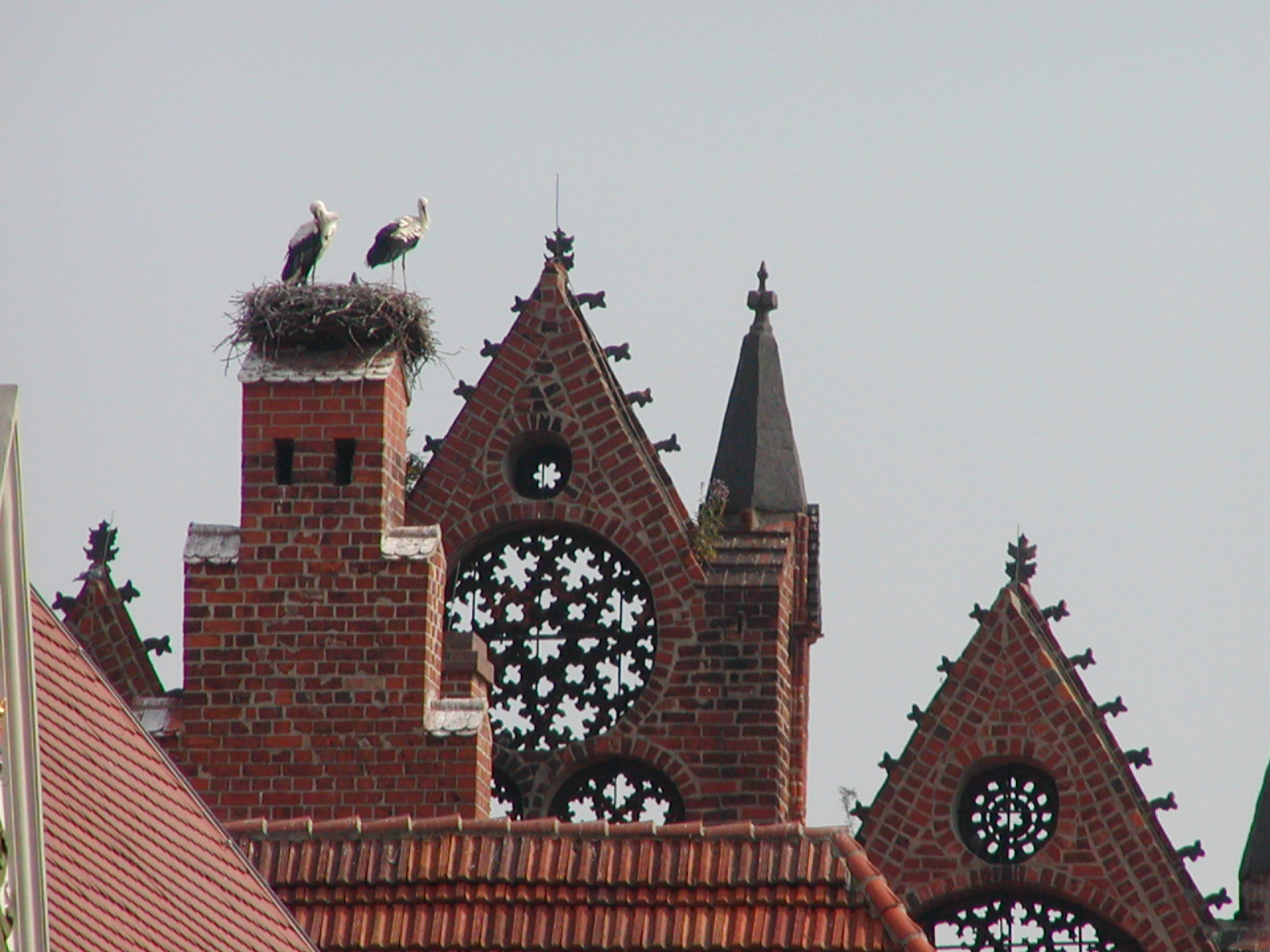 Tangermünde, Störche auf dem Rathaus